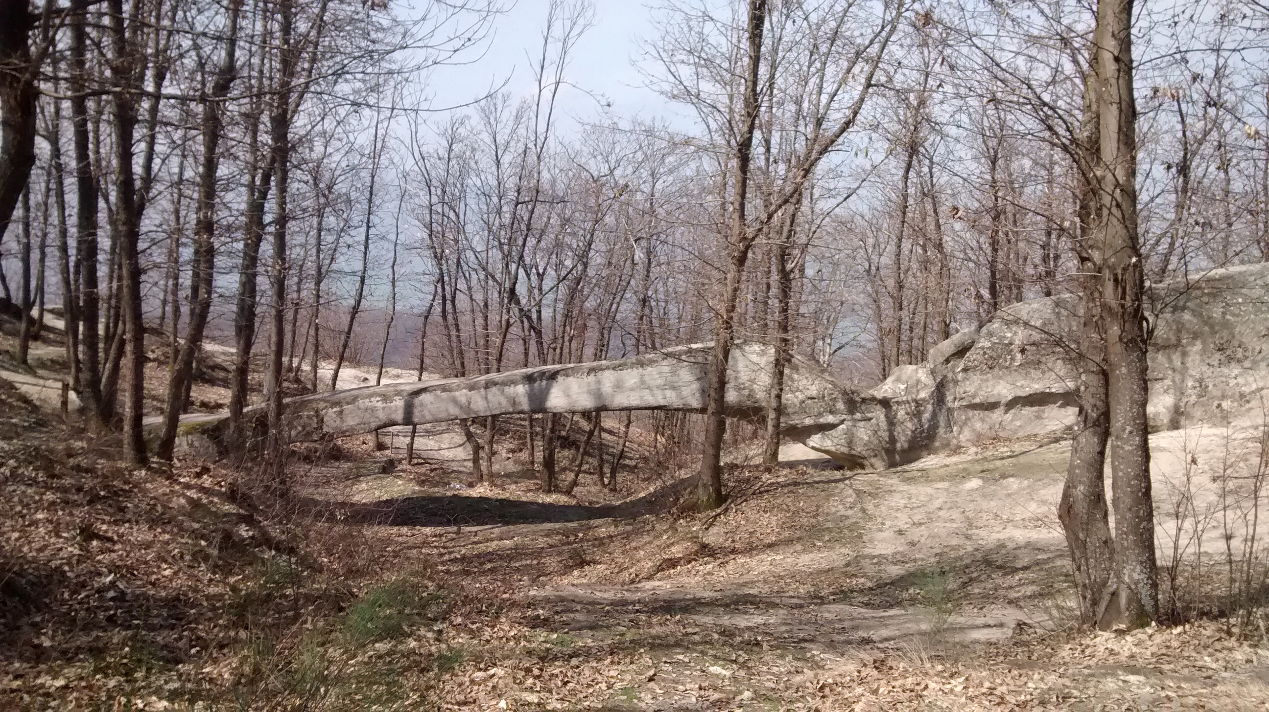 Il Ponte del Diavolo a Marzo